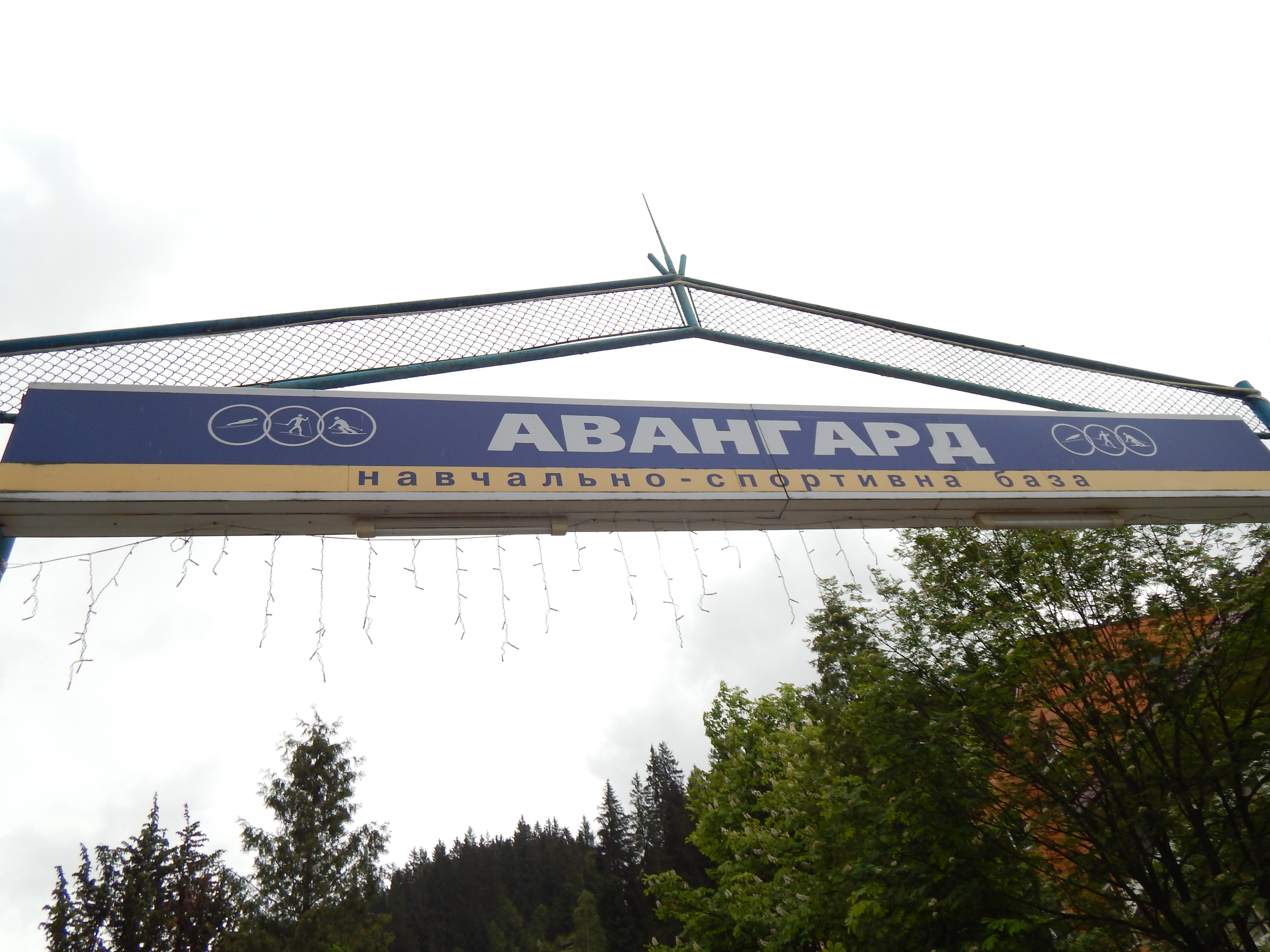 Карпатський, Яремчанська міська рада, Верховинський район, Надвірнянський район